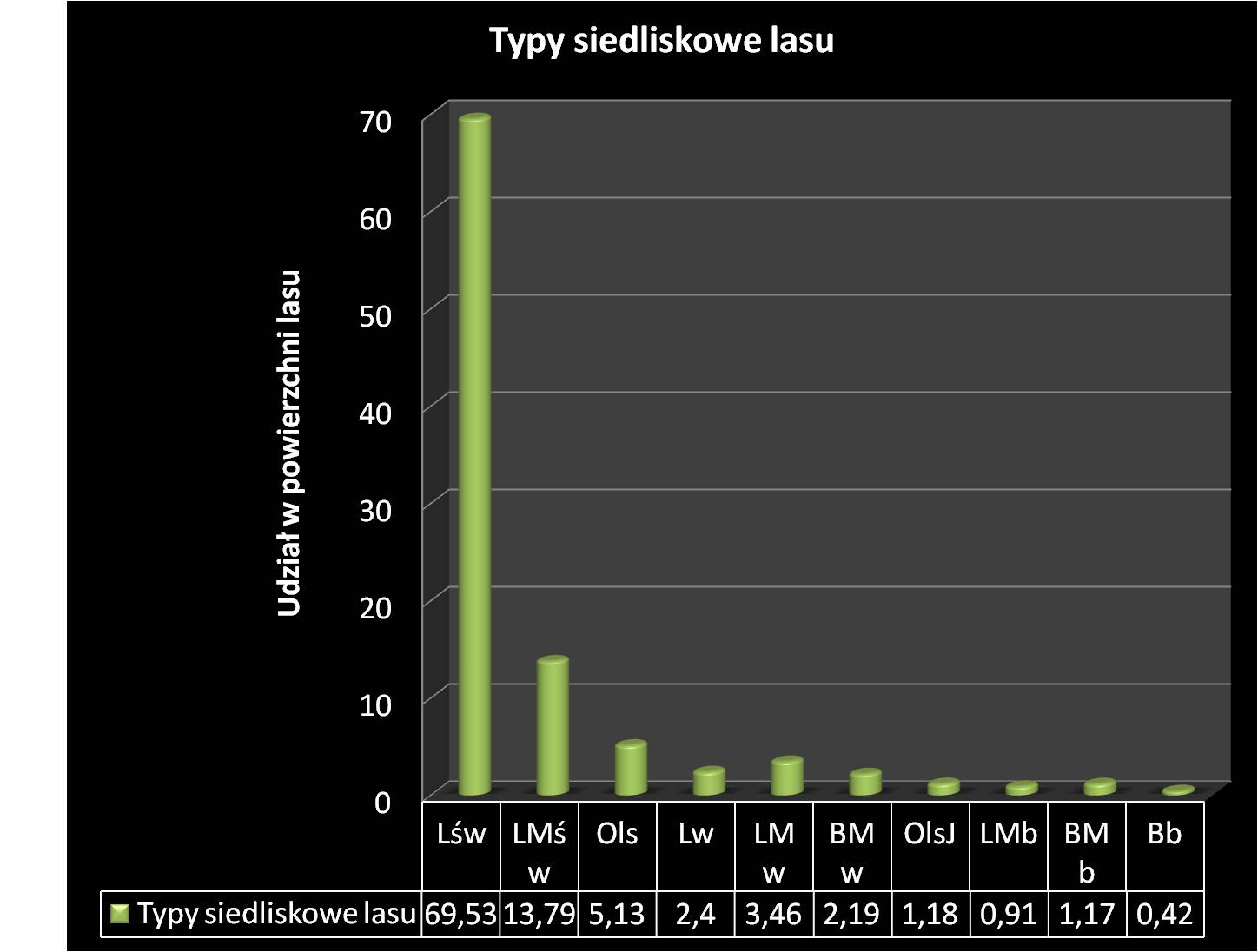 Autor: Adrian Grzegorz